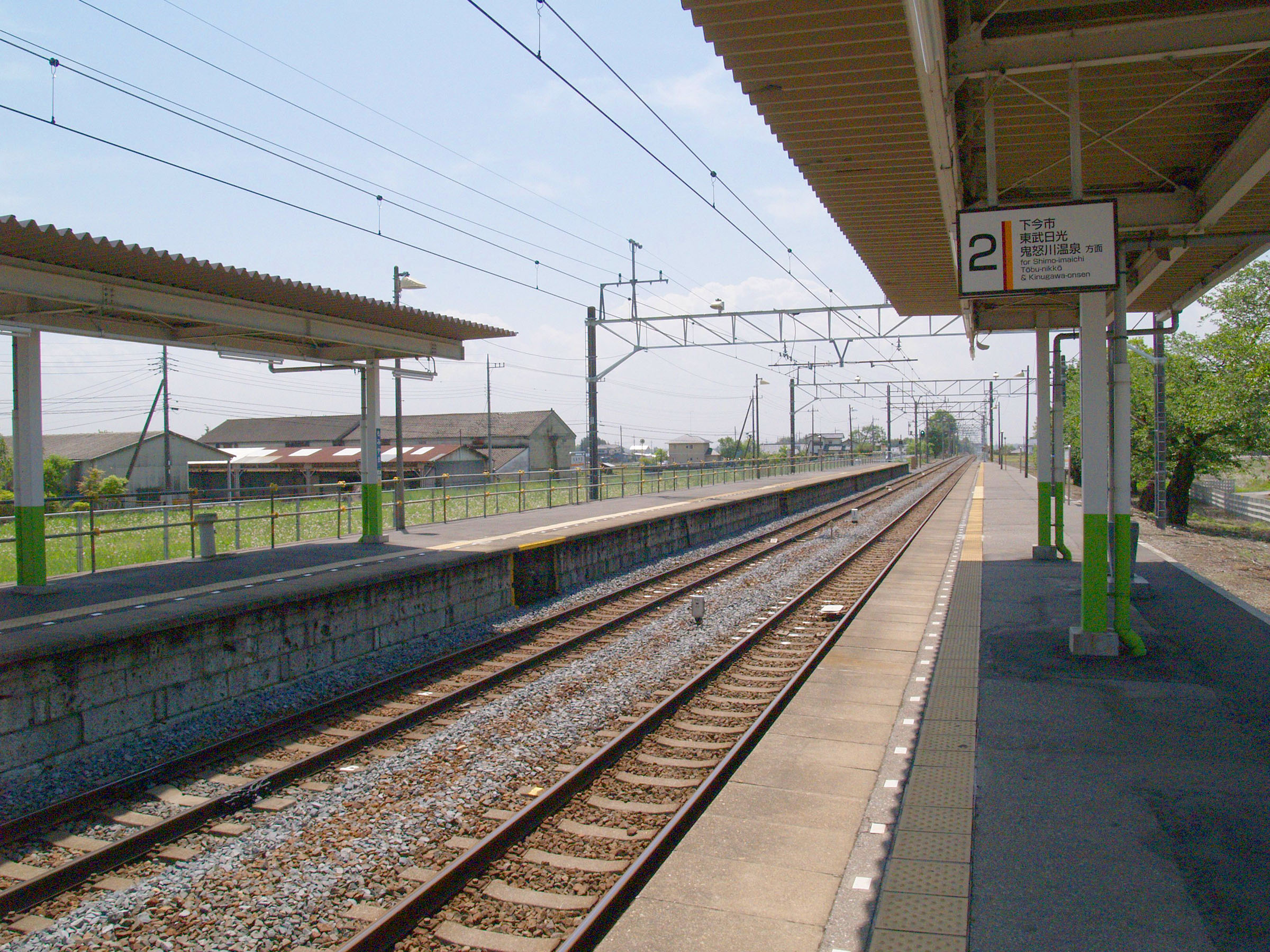 樅山駅ホーム